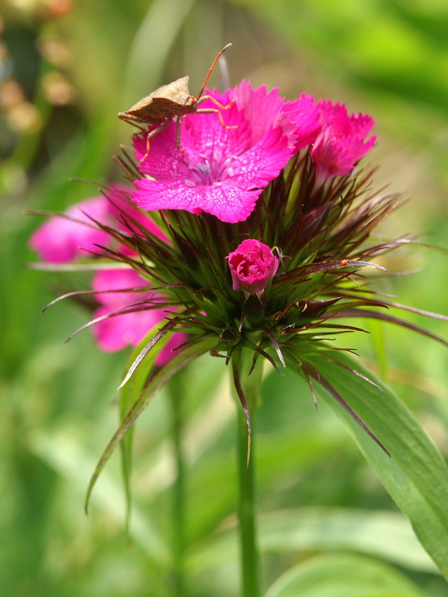 Brkati klinček na Črni prsti